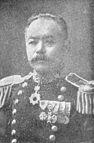 真野観我（1853-1920）